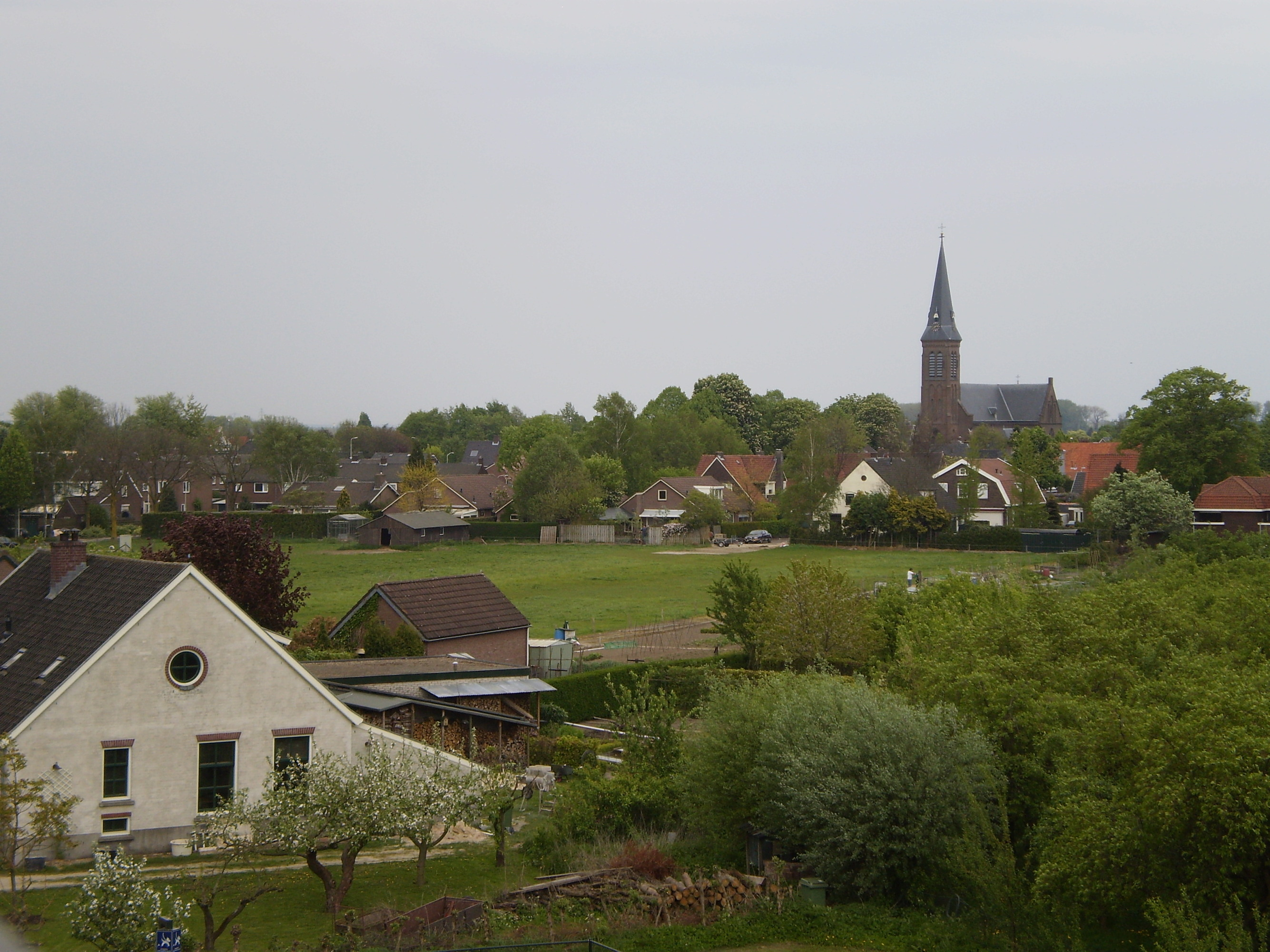 Lent (Nijmegen) skyline